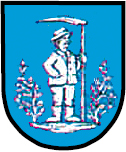 Herb Laryszowa (gmina Zbrosławice, powiat tarnogórski, województwo śląskie, Polska)